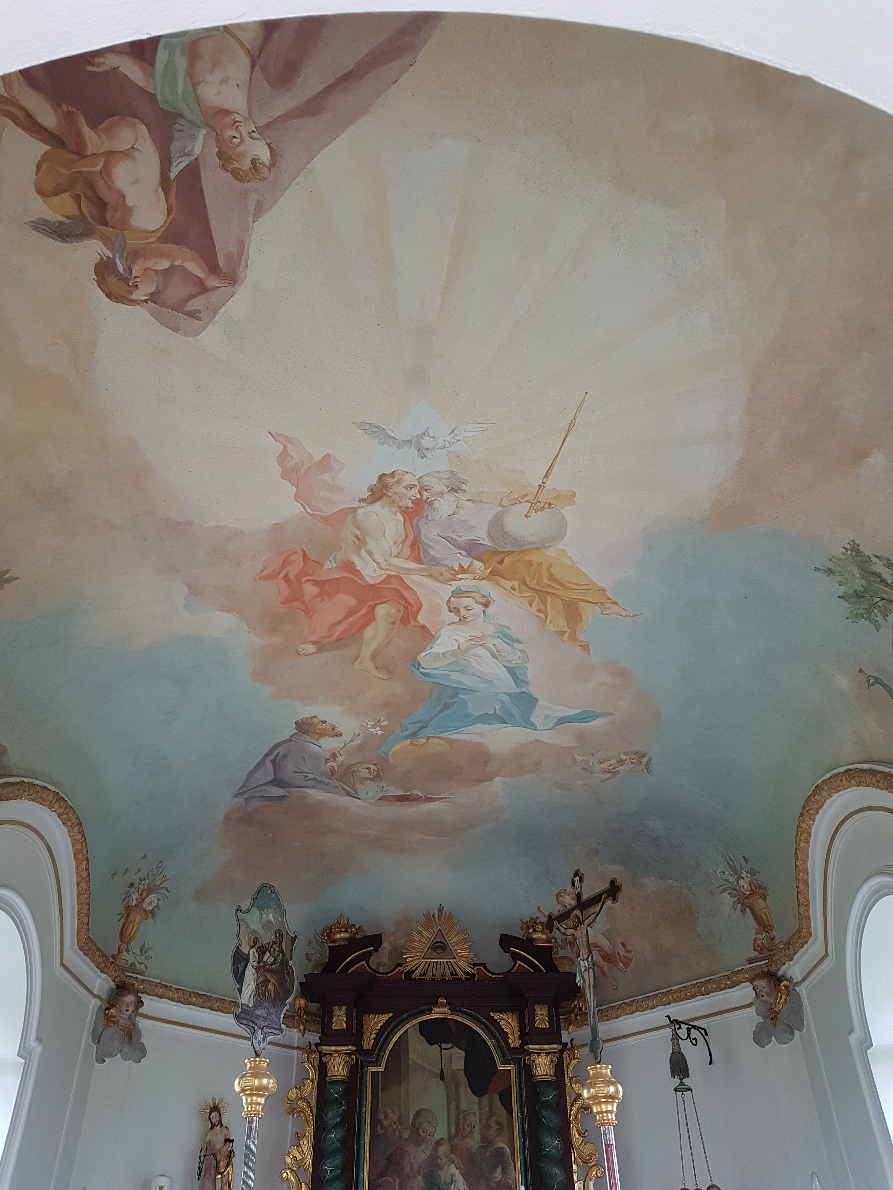 Kapelle